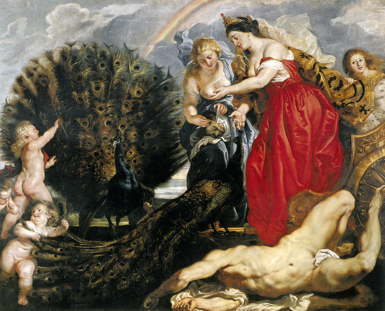 Peter Paul Rubens. Juno and Argus. circa 1611 date QS:P,+1611-00-00T00:00:00Z/9,P1480,Q5727902.